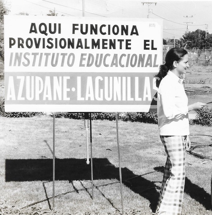 La filántropa venezolana Betty Cecilia Lugo, fundadora del centro de educación especial AZUPANE-Lagunillas, en los jardines de la institución.